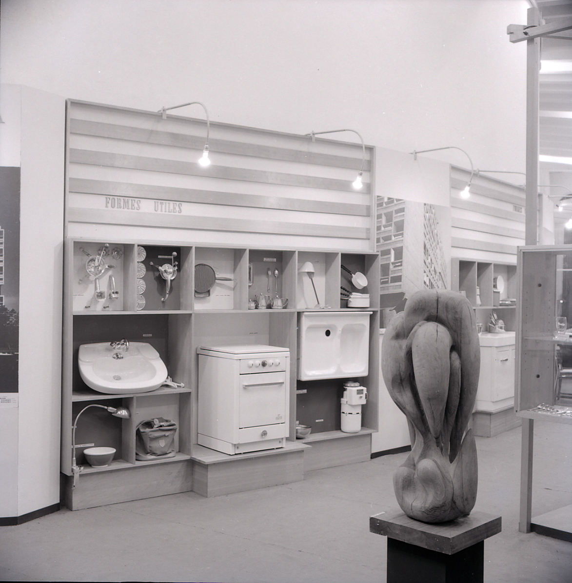 Servizio fotografico : Milano, 1954 / Paolo Monti. - Buste: 29, Fototipi: 32 : Negativo b/n, gelatina bromuro d'argento/ pellicola ; 6x6. - ((Serie costituita da 32 negativi identificati con i nn.: 21010-21040. Numerazione parallela con buchi: 1447-1481. La suddetta serie è contenuta nella scatola identificata con la numerazione 20799-21085. Sulla scatola manoscritto con pennarello nero: "X Triennale". - Occasione: Documentazione della X Triennale del 1954, intitolata "Prefabbricazione - Industrial Design: Esposizione Internazionale delle Arti Decorative e Industriali Moderne e dell'Architettura Moderna". L'esposizione si tenne presso il Palazzo dell'Arte. - Fonte: Fattura di Paolo Monti: IV . Commesse/ Fattura n. 32/ Fotografie d'archivio per volume sulla Triennale di Milano (1977/11/28), presso Archivio Paolo Monti. n. 15 fotografie decime Triennale di Milano 1954